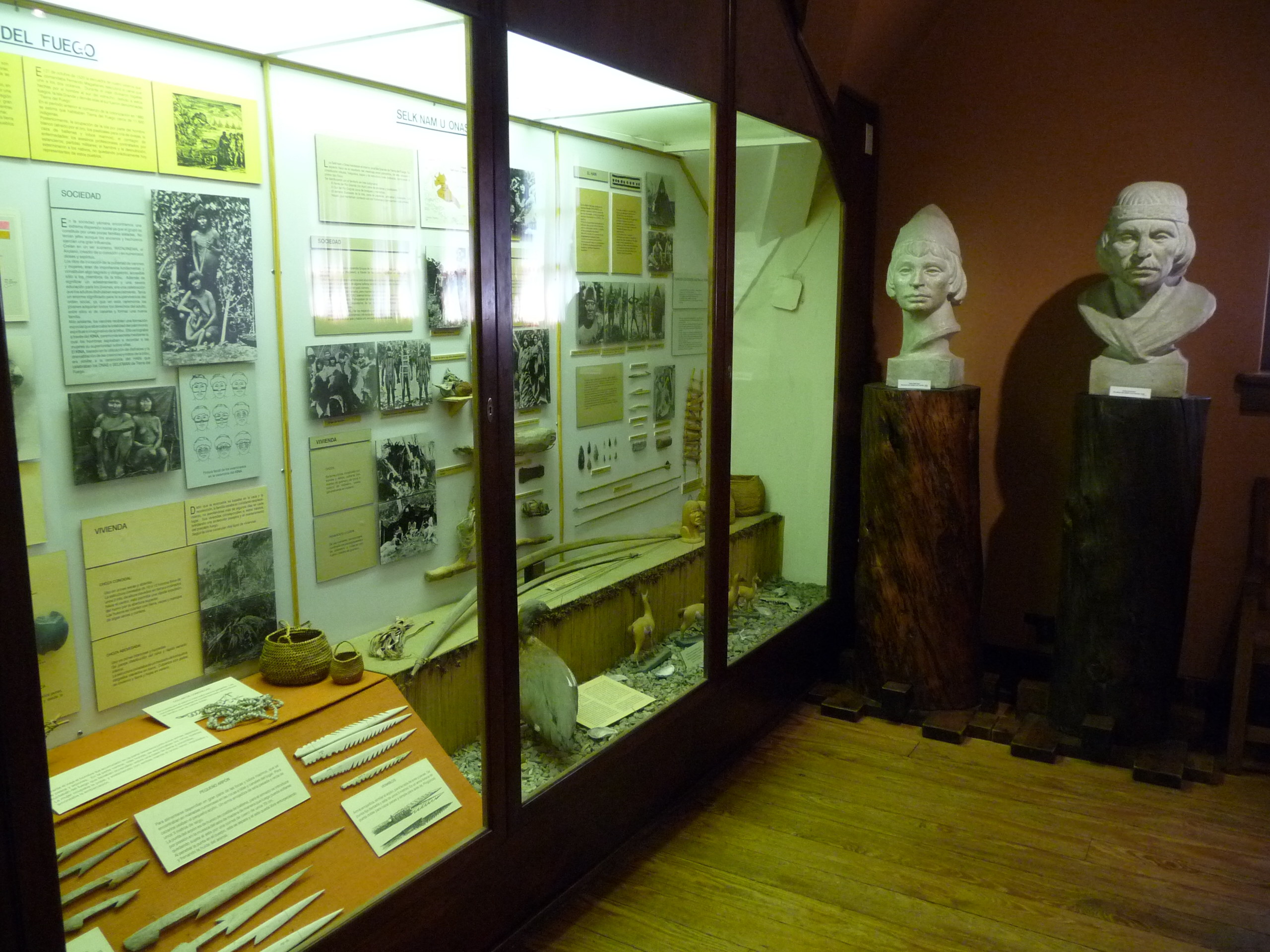 Sala del Museo de la Patagonia Francisco P. Moreno en San Carlos de Bariloche, Argentina